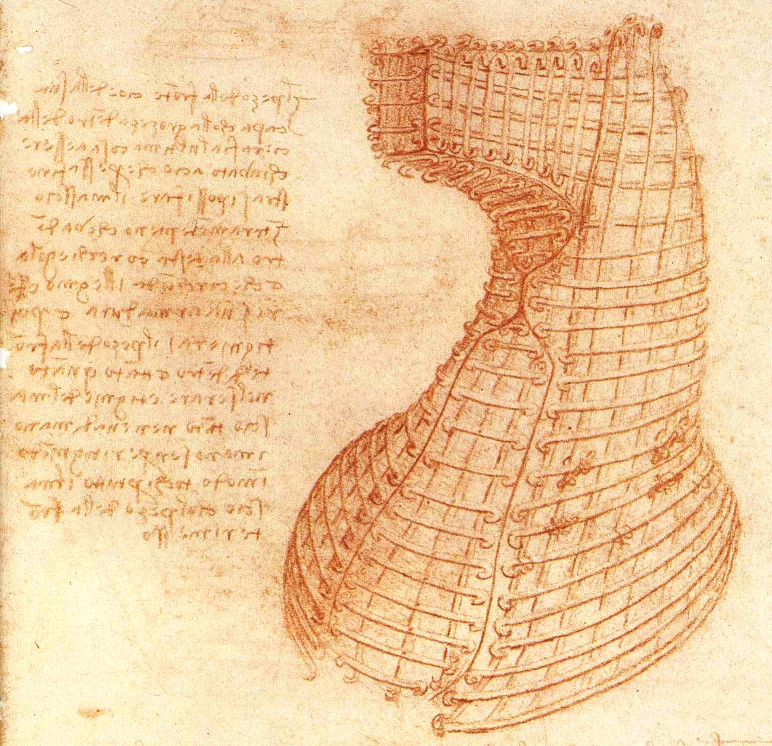 Monumento Sforza